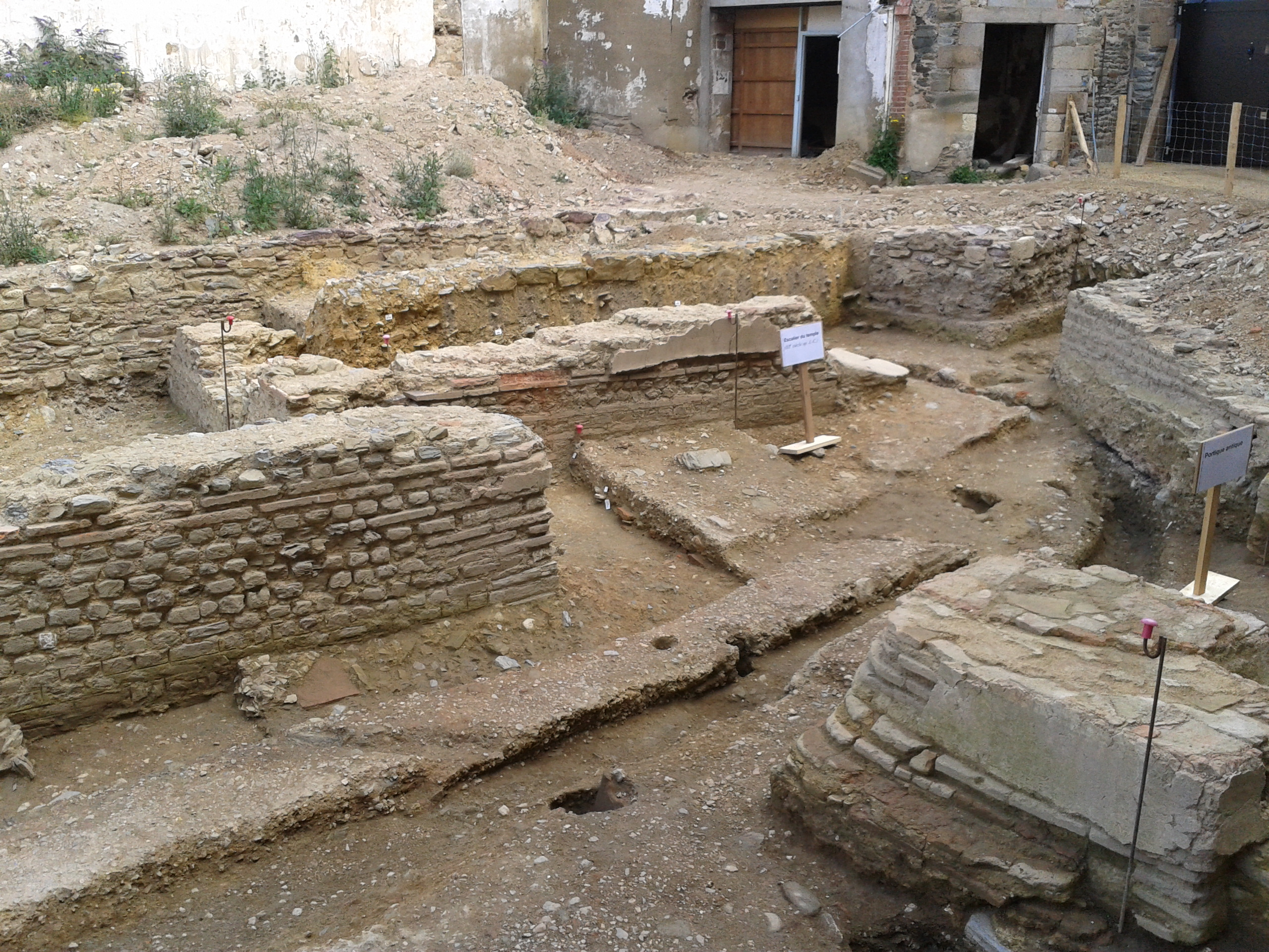 Fouilles d’un ancien temple romain dans la cour nord du couvent de Bonne-Nouvelle, lors des Journées du Patrimoines.